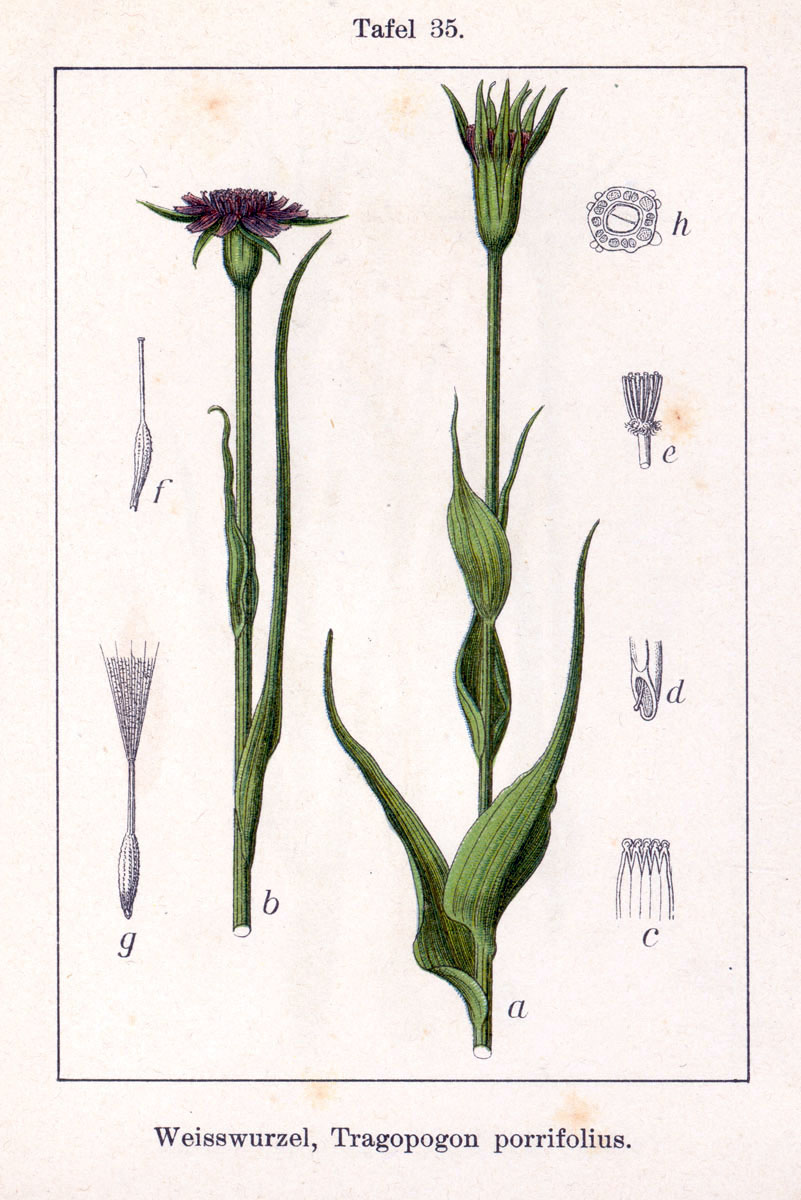 Tragopogon porrifolius L. Original Description "Weisswurzel", Tragopogon porrifolius